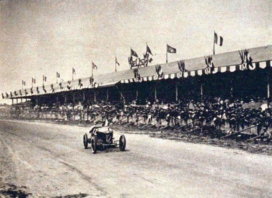 GP de l'ACF 1923, victoire de Seagrave sur Sunbeam en Touraine.